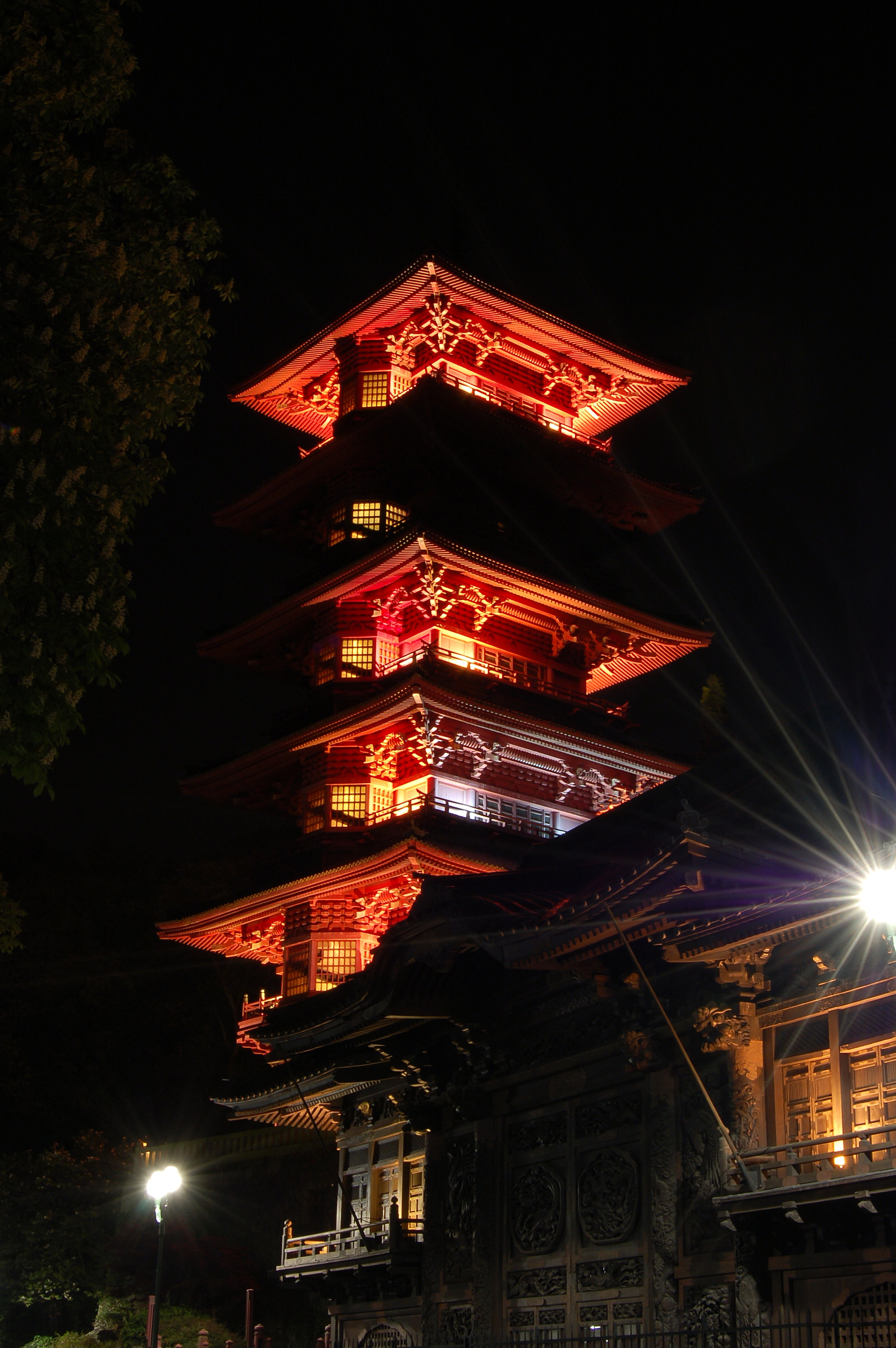 Tour Japonaise de Bruxelles by night.